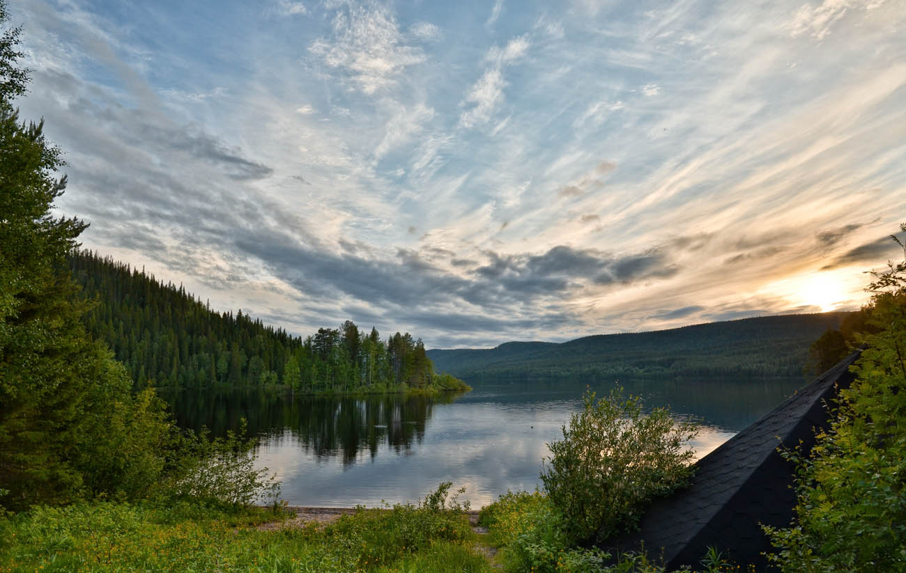 Паанаярви: Западная граница национального парка совпадает с государственной границей России с Финляндией. Со стороны финской границы к “Паанаярви” примыкает национальный парк “Оуланка”,Лоухский район, This image is related to the protected area of Russia number 1000069